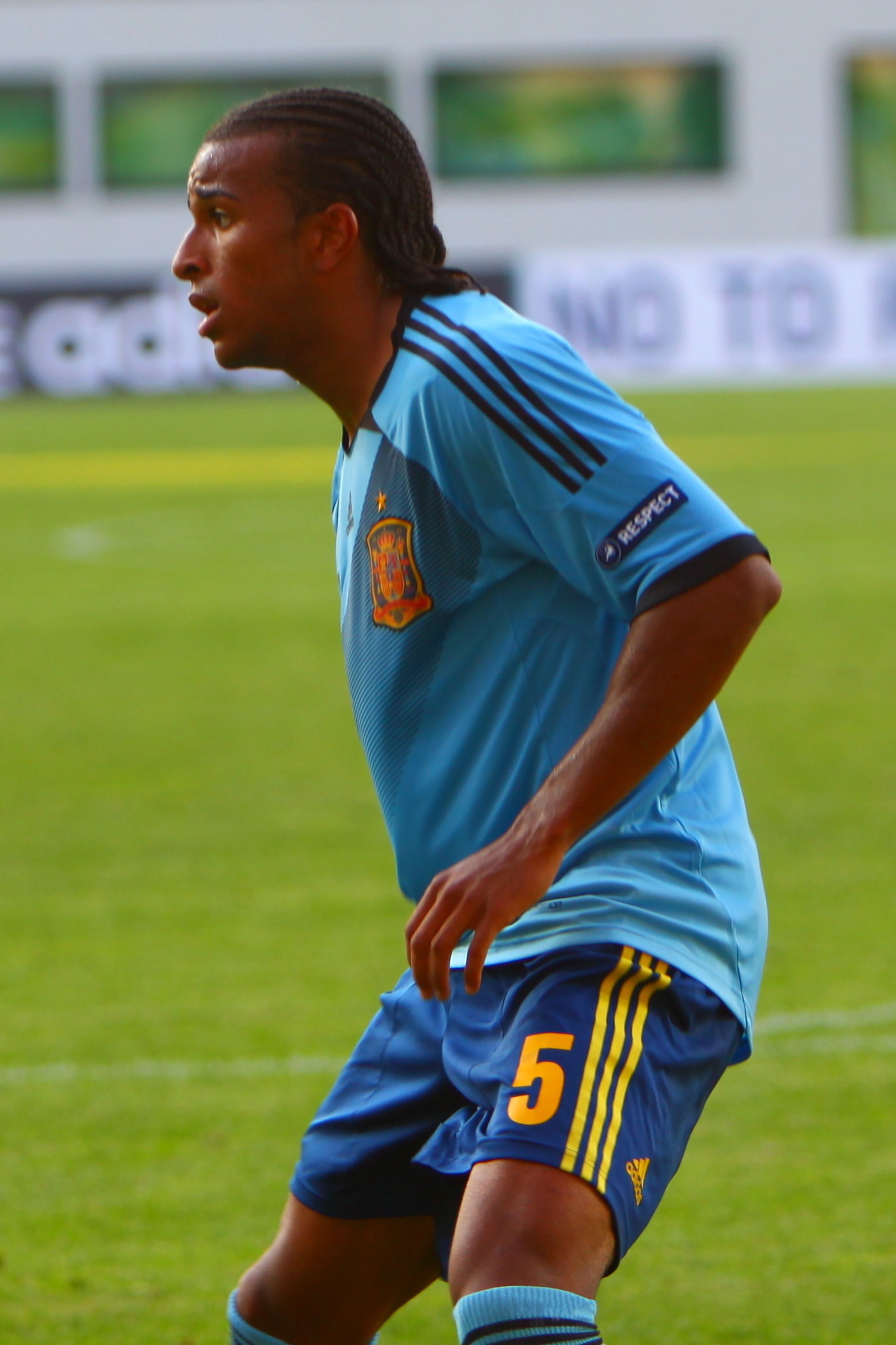 U-19 Portugal vs Spain.